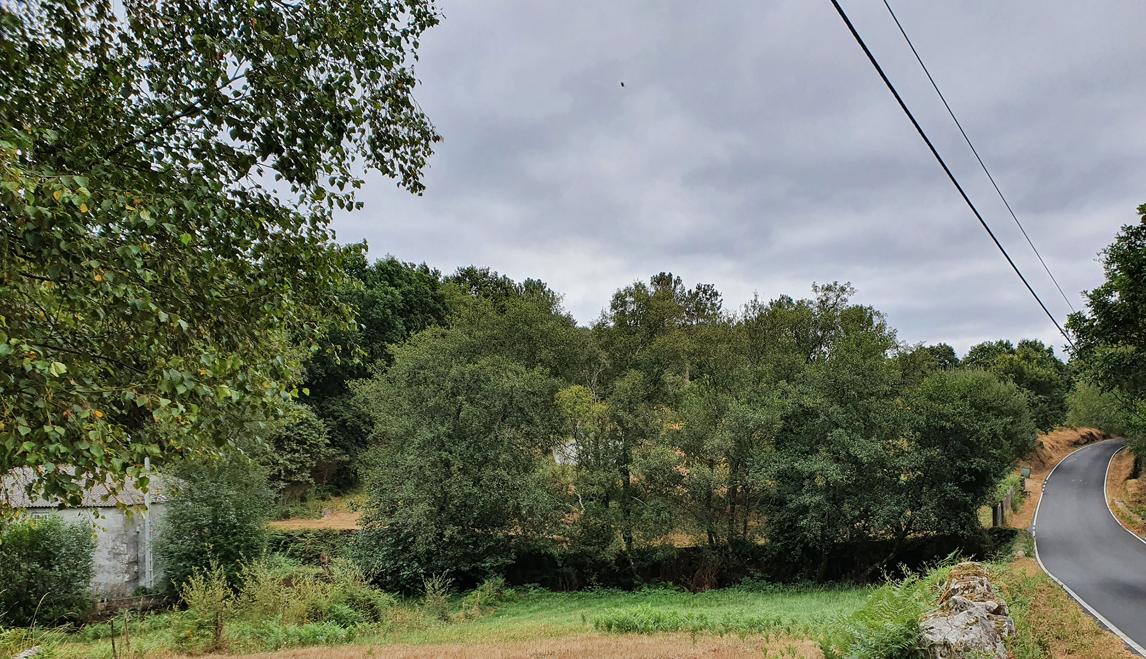 Lugar dos Píos, na parroquia de Santa Mariña de Amarante (Antas de Ulla). Unha única construción, que foi un muíño, ubicada a carón dun regato poucos metros antes de albiscar o Pazo de Santa Mariña, á entrada da localidade.